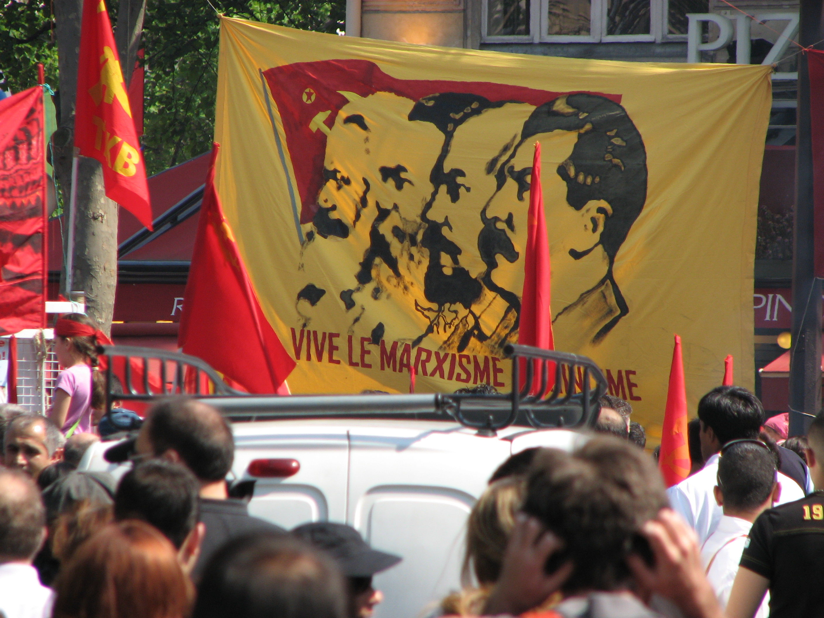 stalinists (!)